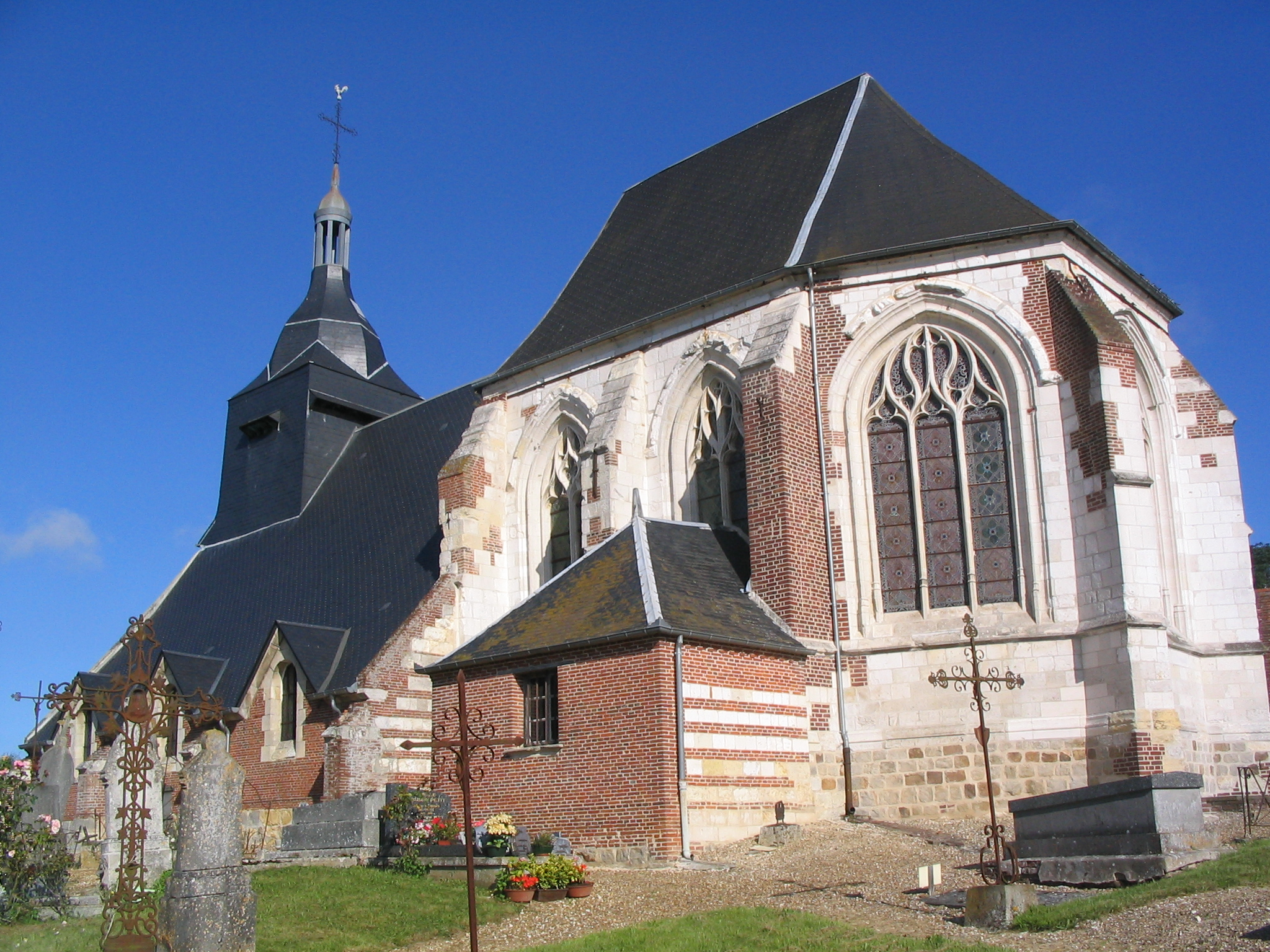 Eglise de Bonvillers (Oise)